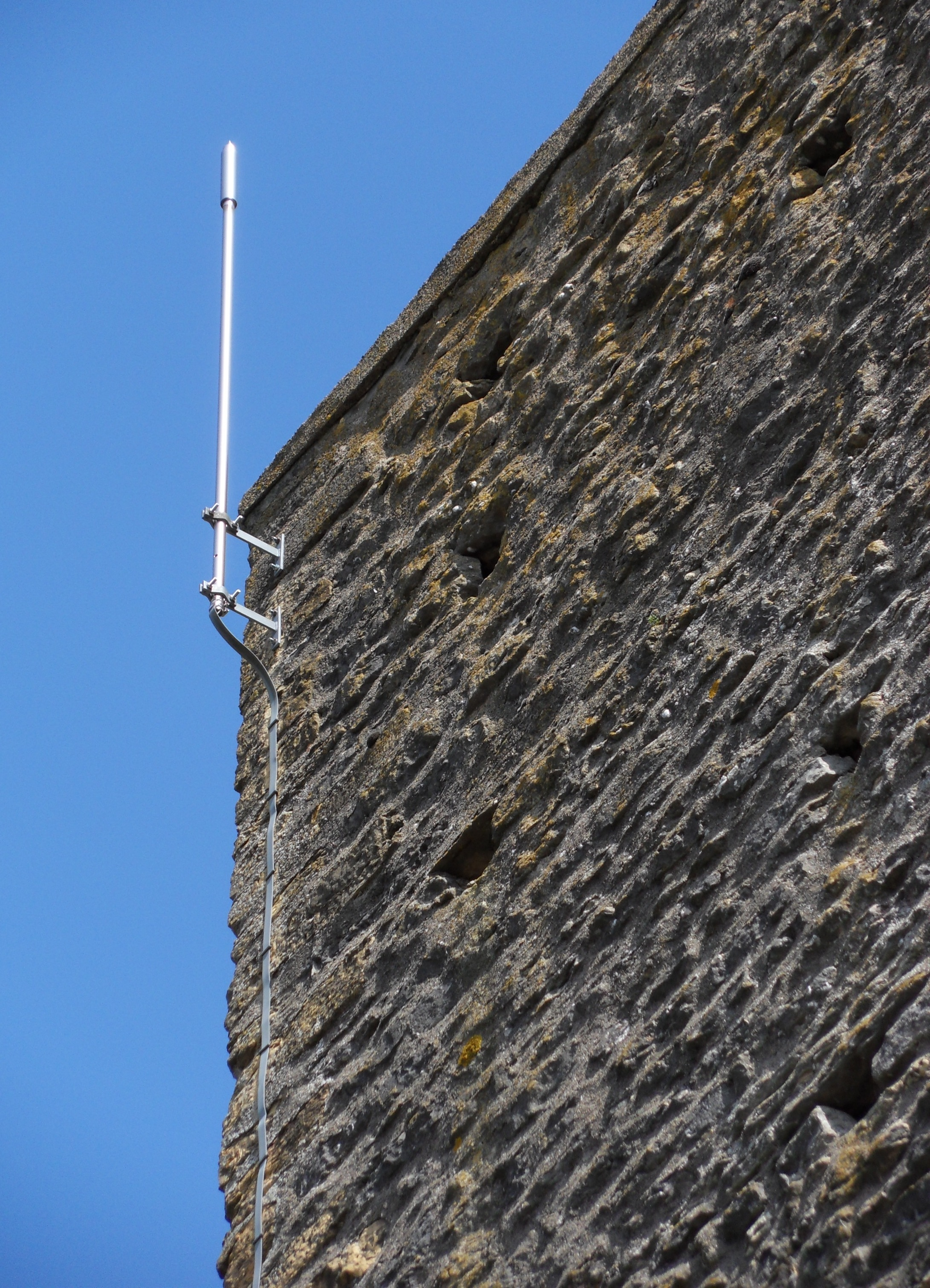 Paratonnerre de la tour du Château de Saint-Cyr.